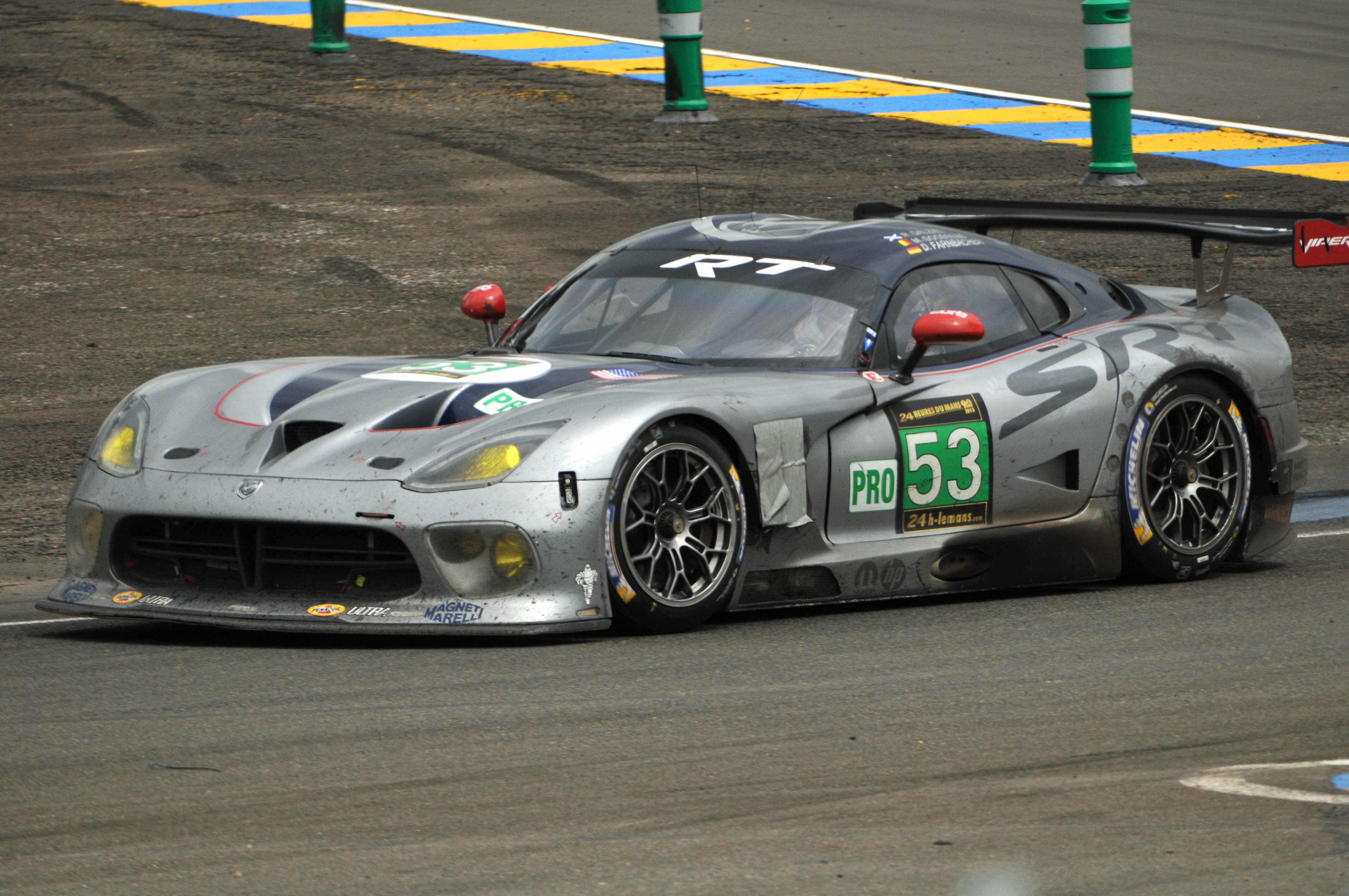 Le Mans 2013